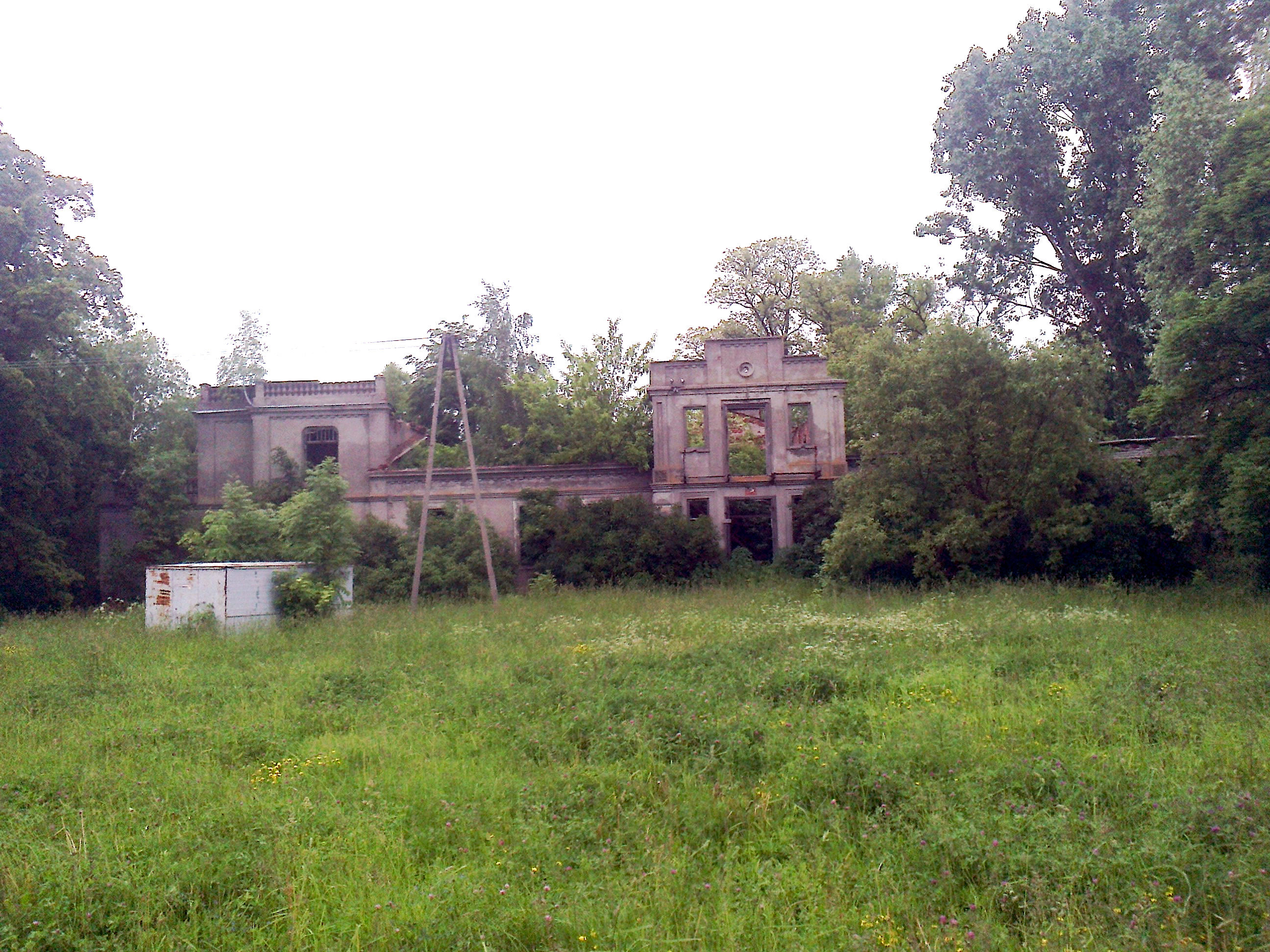 stan obecny dworu w Janowicach w powiecie łęczyckim